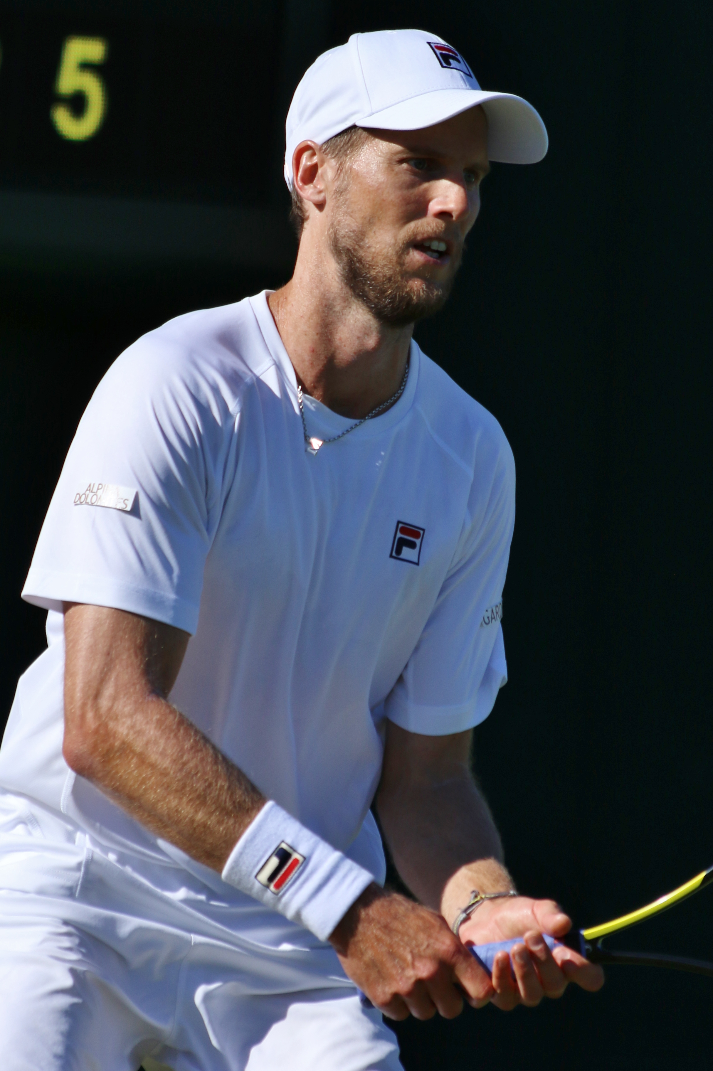 Seppi WM18 (15)